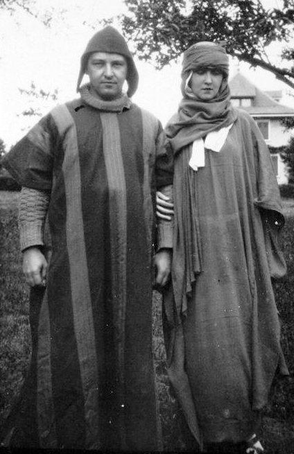 Arthur Honegger (1892-1955) et Andrée Vaurabourg (1894-1980) lors de la création de Judith à Mézières